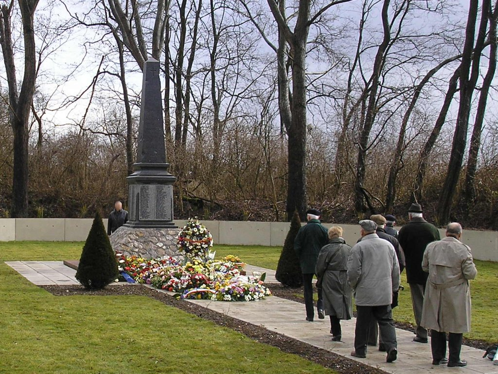 Nécropole de Méricourt (Pas-de-Calais), monument aux victimes de la catastrophe du 10 mars 1906 prise lors des cérémonies du centième anniversaire par moi même.